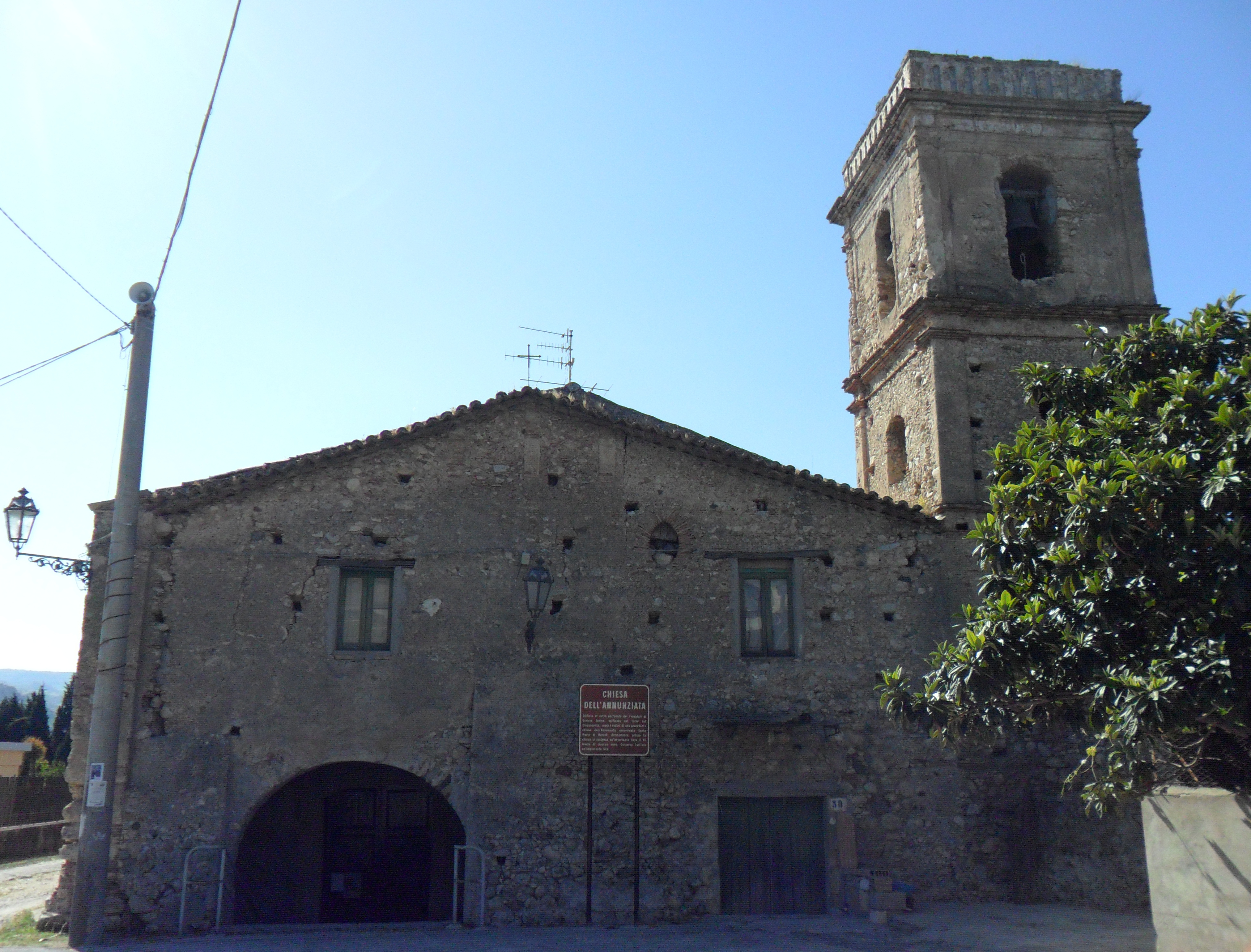 Gioiosa Jonica Chiesa dell'Annunziata